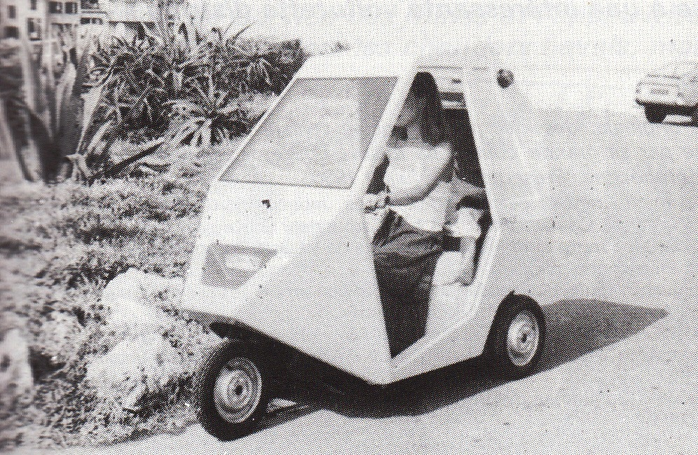 kikos T040